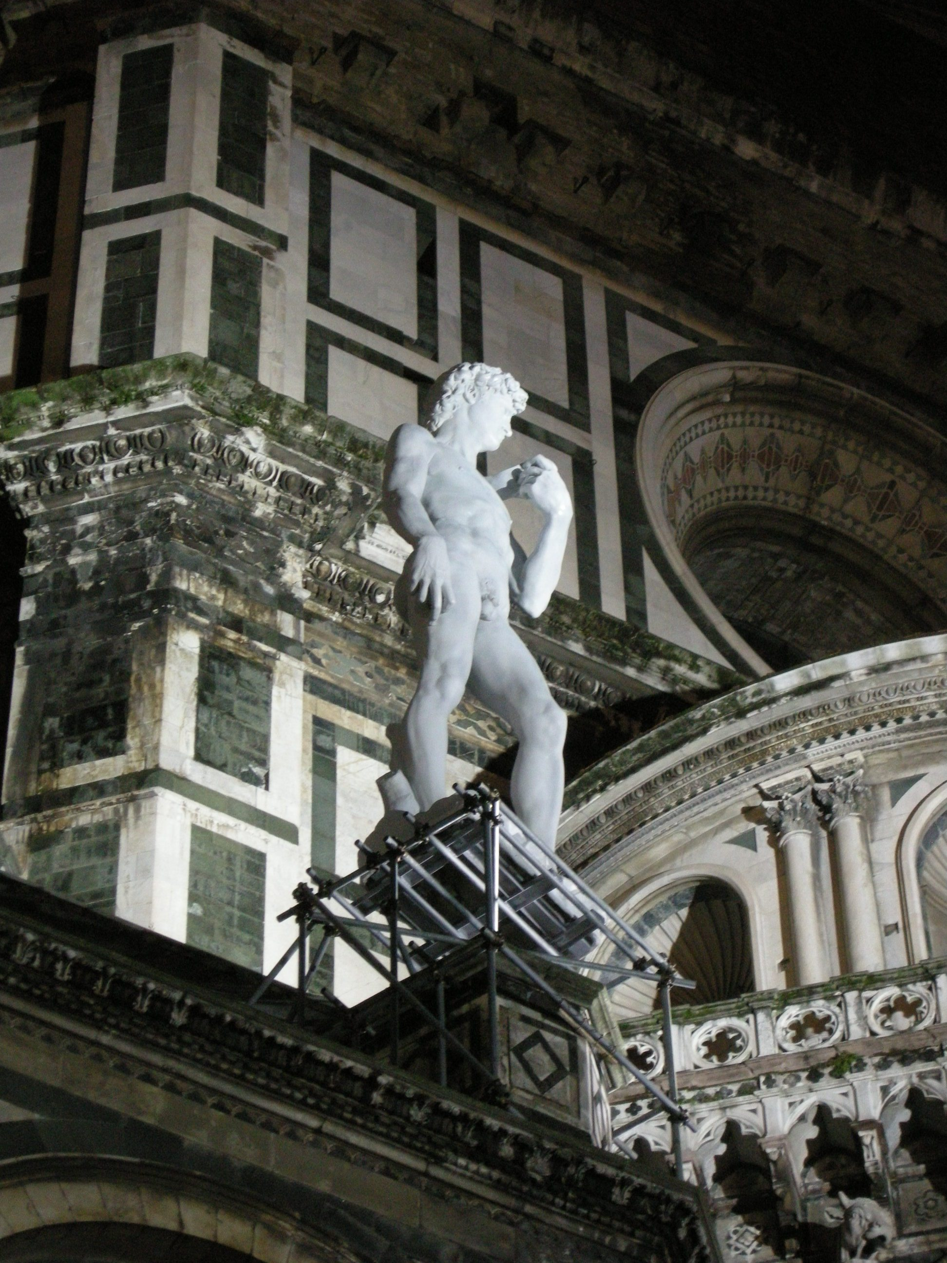 David sullo sperone del duomo di firenze